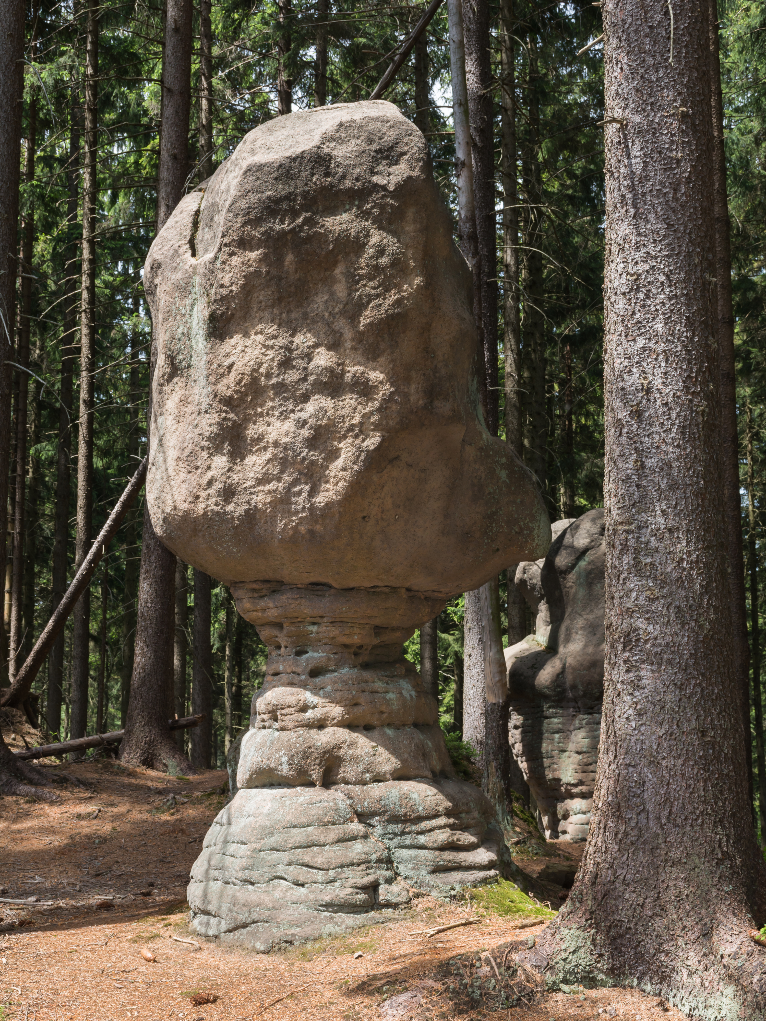 Obszar specjalnej ochrony ptaków Góry Stołowe. This is a photography of Natura 2000 protected area with ID PLB020006